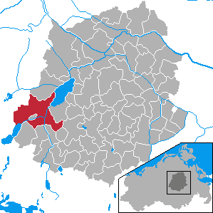 Malchin, Landkreis Demmin, Mecklenburg-Vorpommern